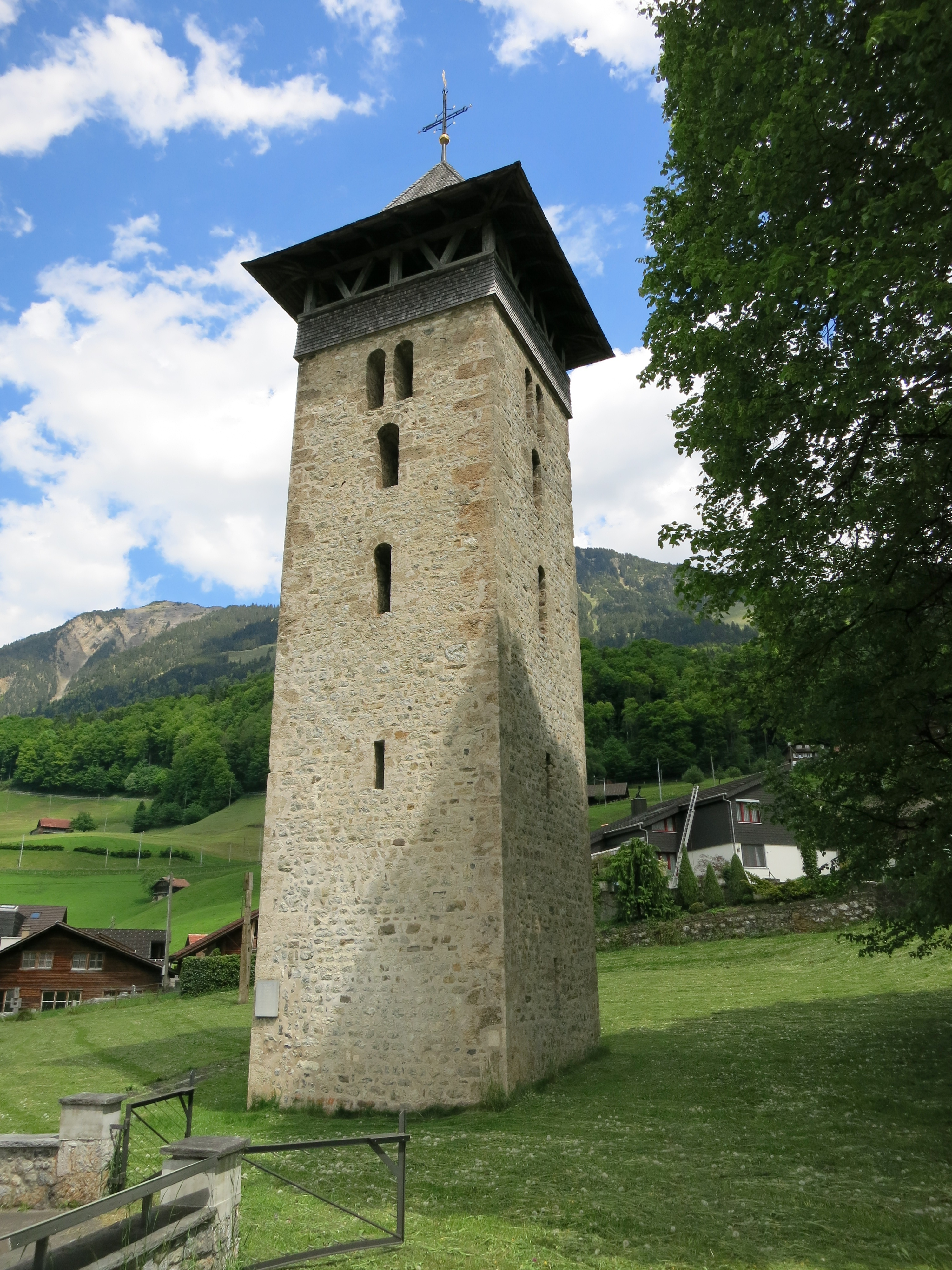 Alte Kirche, Lungern